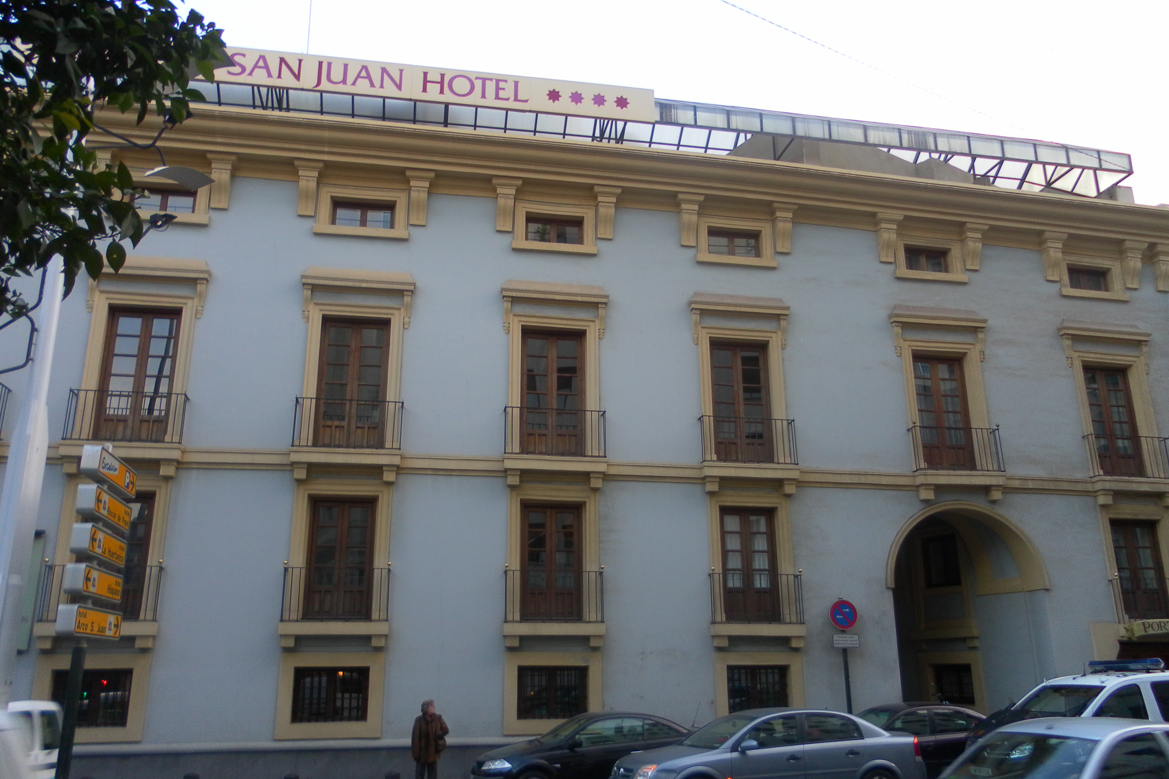 Palacio de Floridablanca. Finales siglo XVIII. Murcia (España).